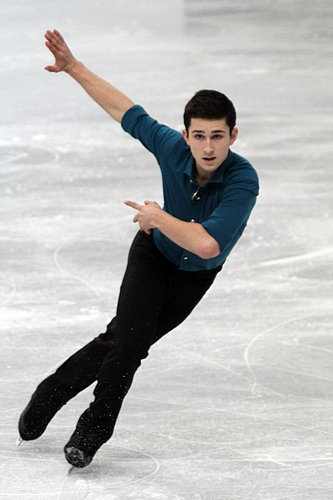 Лиам Фирас (Канада) на чемпионате мира по фигурному катанию среди юниоров 2012